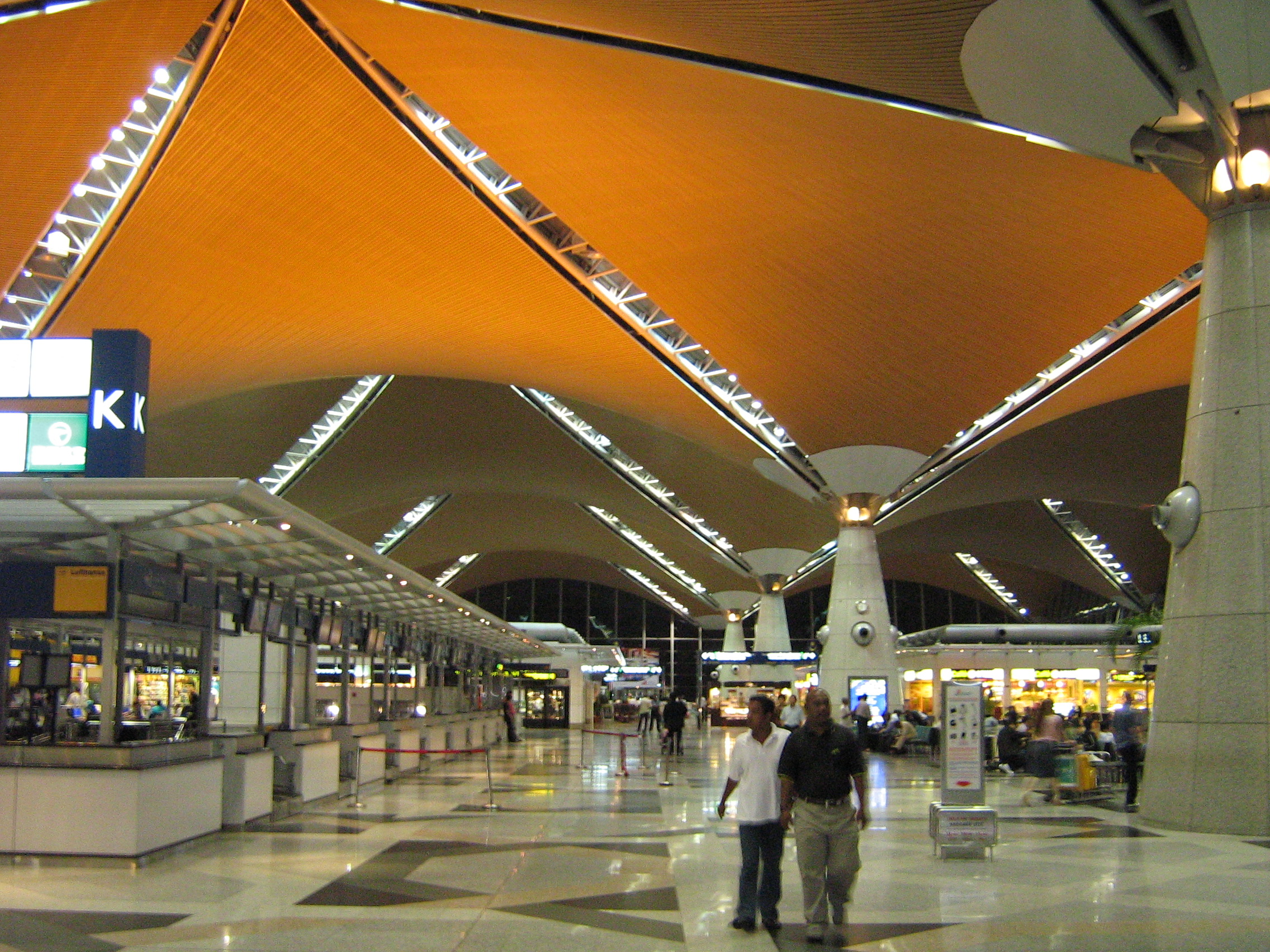 Check-in-Schalter am KLIA